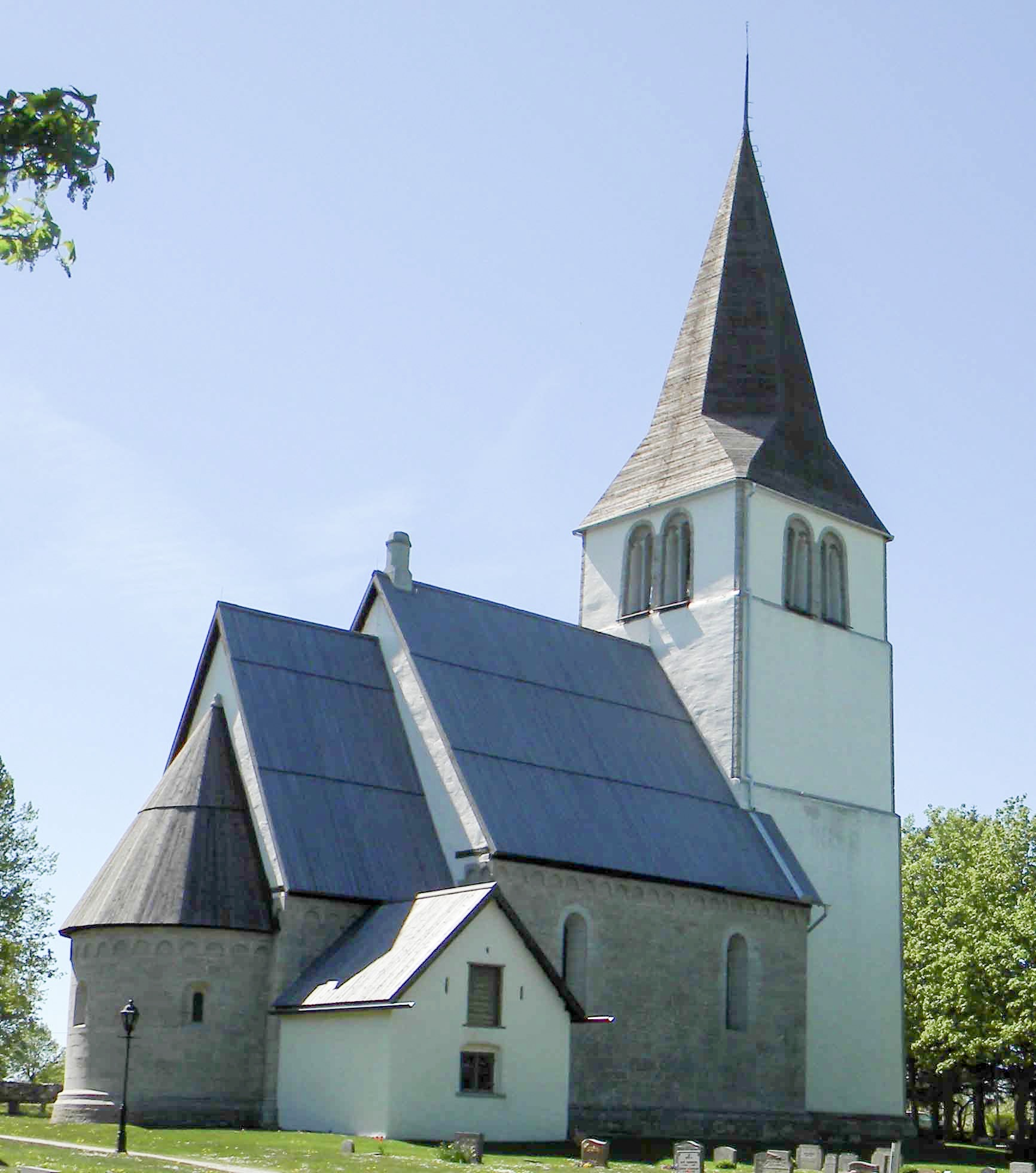 Levide kyrka på Gotland